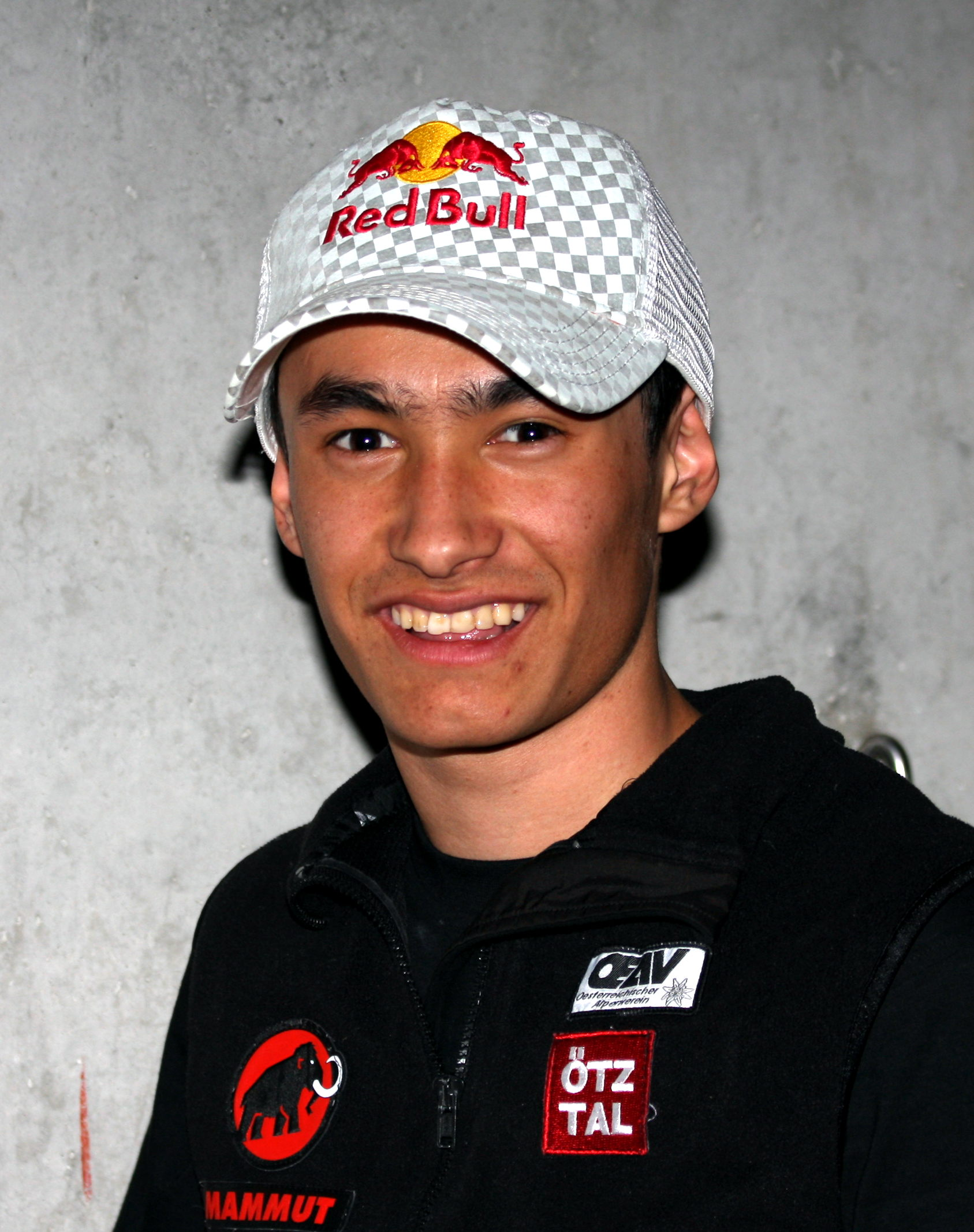 David Lama bei der Veranstaltung Challenge The Wall im Kletterzentrum Gilching.